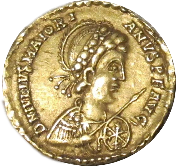 Impero d'occidente, maggioriano, solido in oro (arles), 457-461